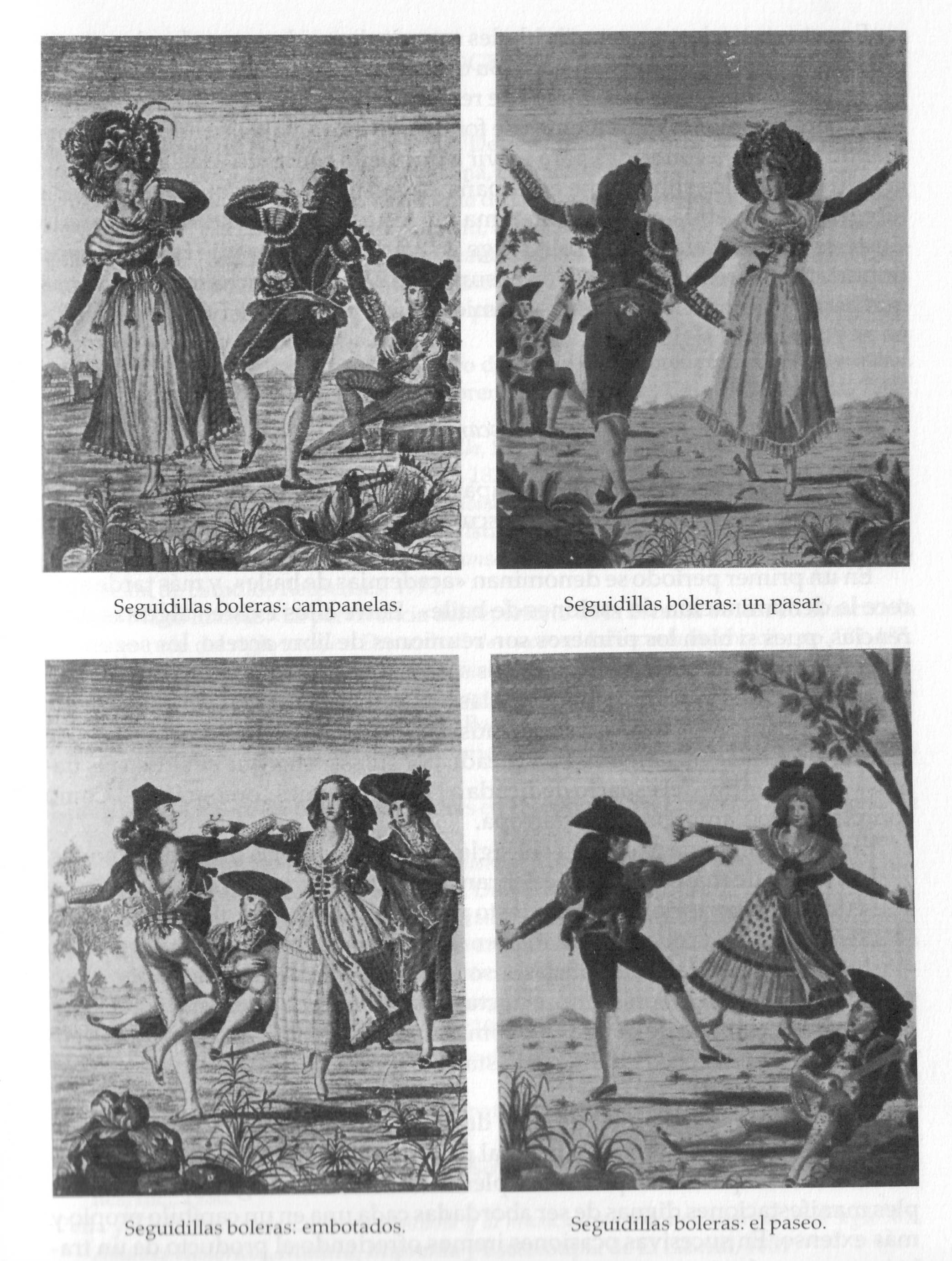 Estampas de cuatro pasos del baile por Seguidillas boleras en la España del siglo XVIII, en un grabado obra de Marcos Téllez Villar, conservado en la Biblioteca Nacional de España (Madrid). [1]